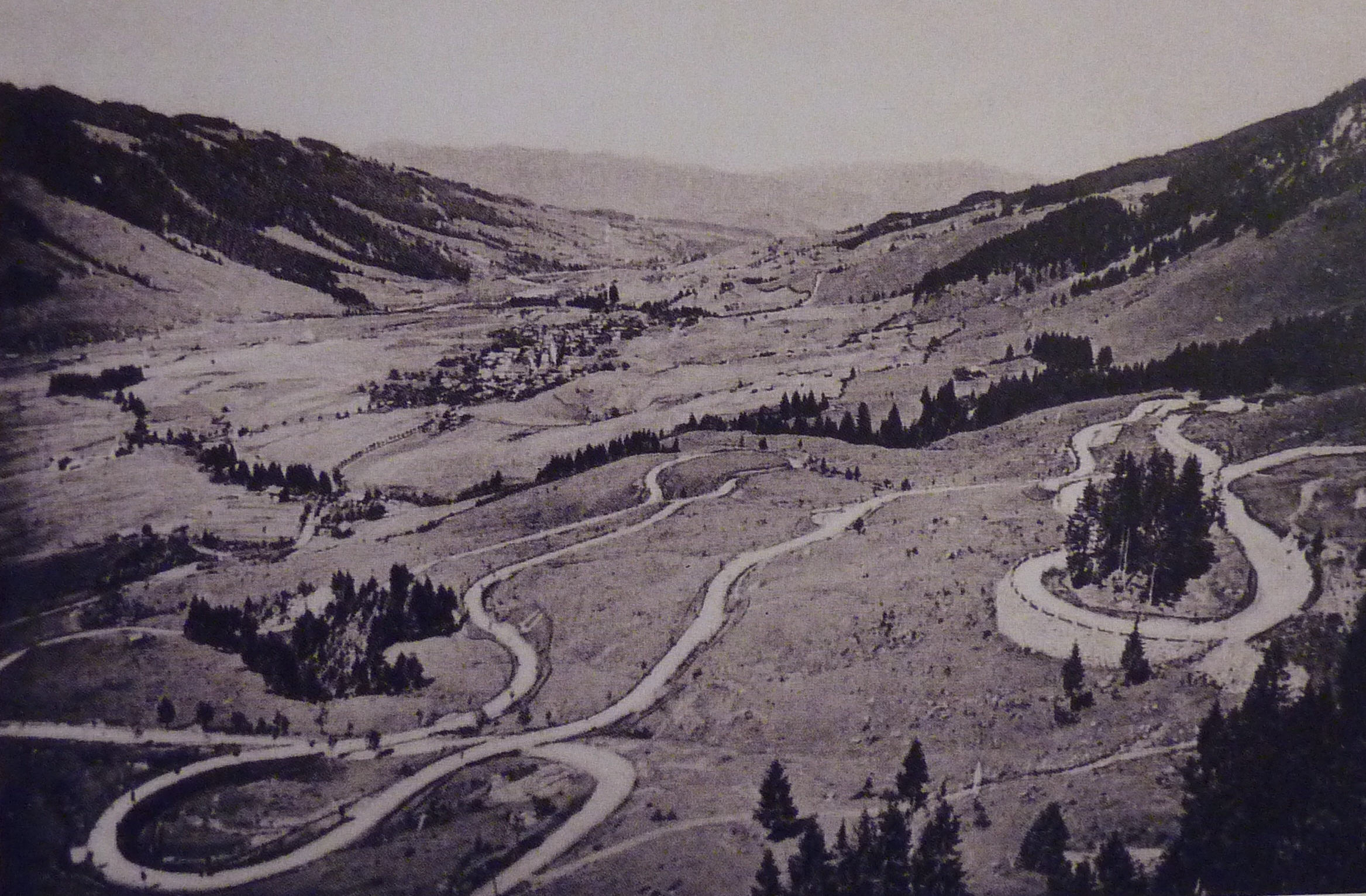 Oberjochpass